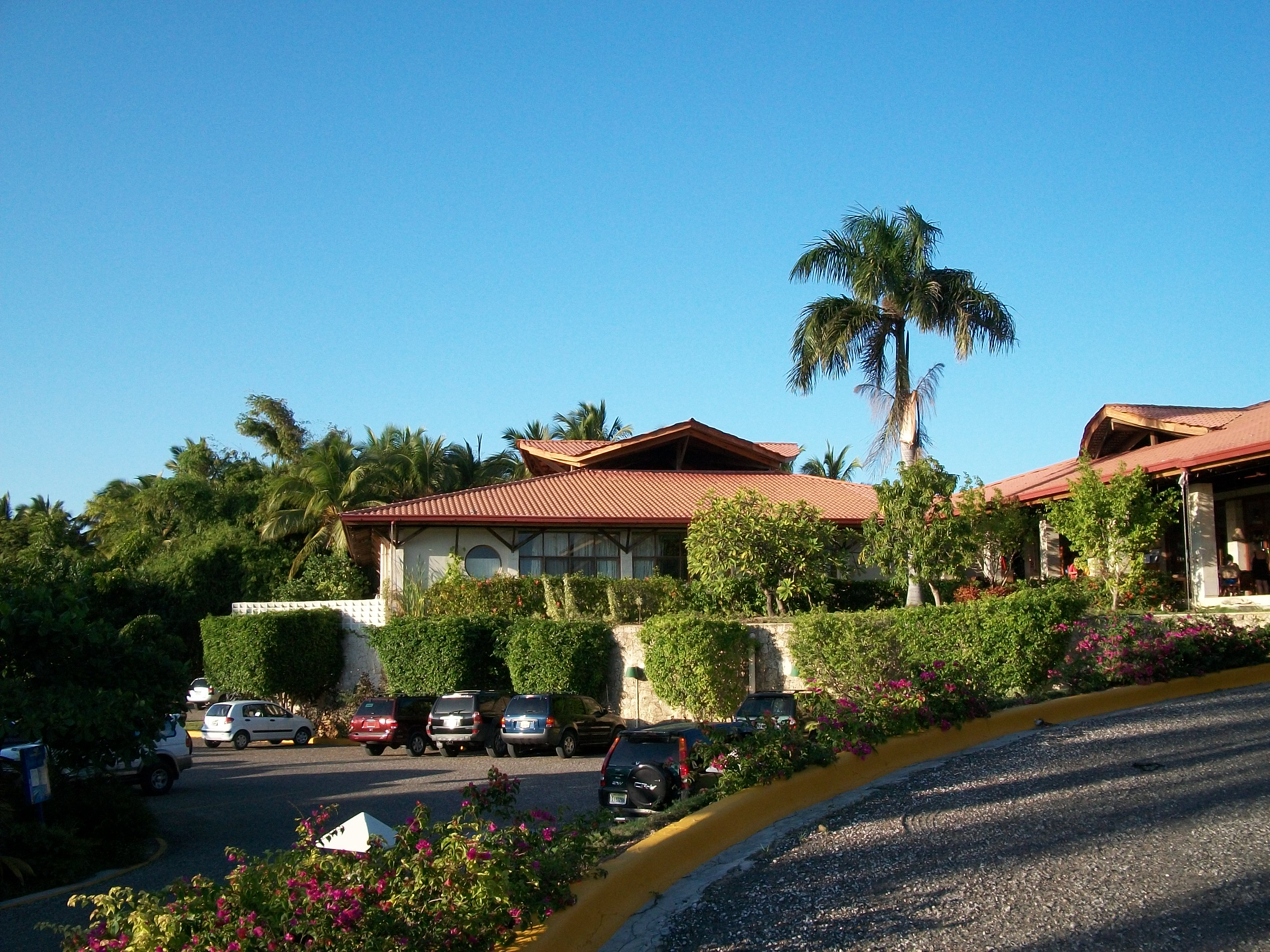 Entrada del Natura Park